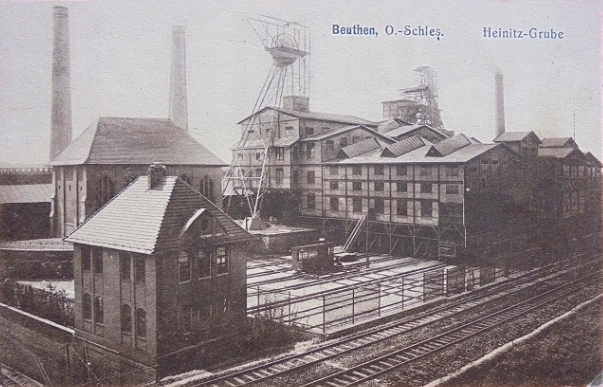 kopalnia Heinitz (późniejsza KWK Rozbark) w Bytomiu, niemiecka pocztówka